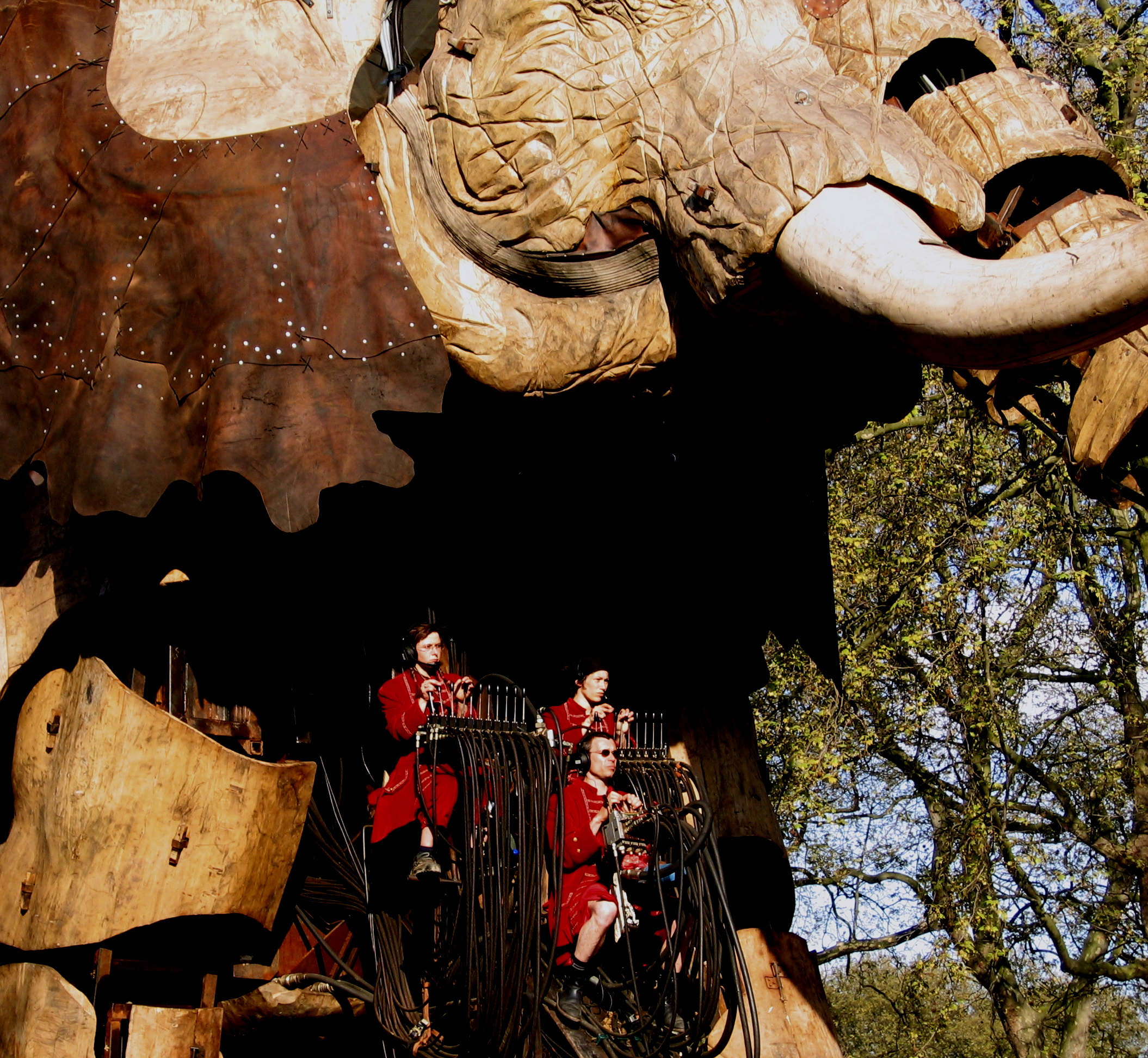 Trio de manipulateurs, sous la tête de l' Eléphant, de la troupe "Royal de Luxe" (en parade à Londres, en mai 2006). On remarque que : chaque manipulateur est devant un pupitre de commandes. plusieurs leviers devant chacun d'eux sont reliés aux tuyaux des circuits hydrauliques. (A la date de l'import depuis Flickr par Marc ROUSSEL, l'auteur n'avait ni légendé ni commenté sa photo.)